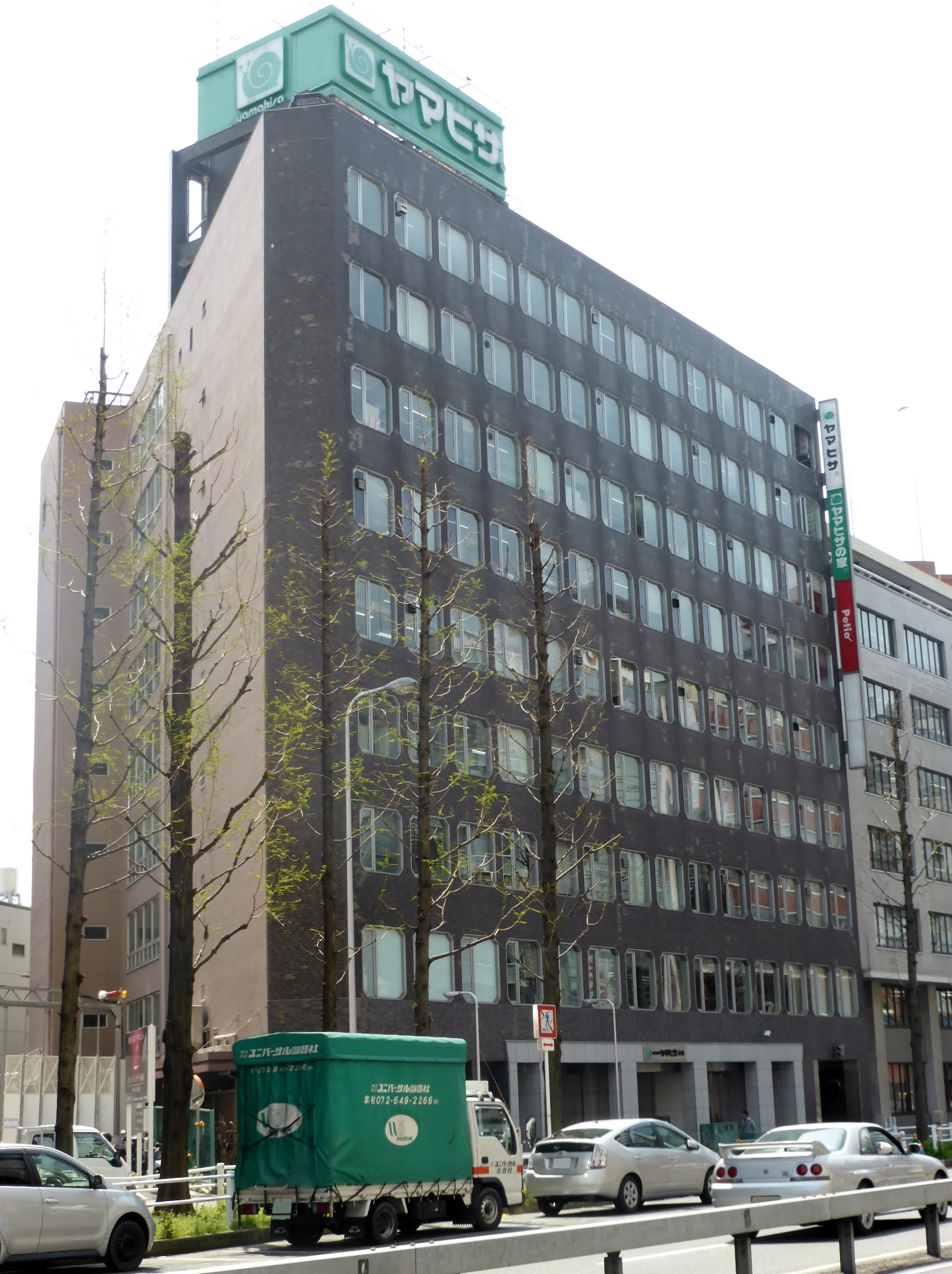 株式会社ヤマヒサ本社を撮影。